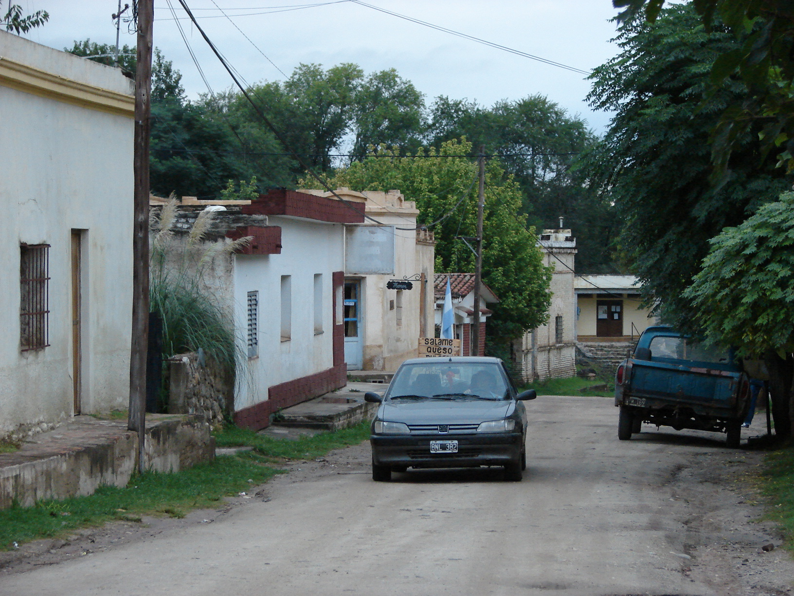 Amboy, Cordoba, Argentina